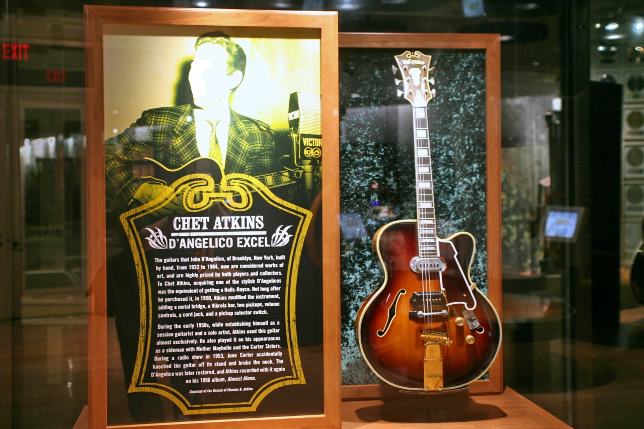 D'Angelico Excel (1950), Chet Atkins, CMHF